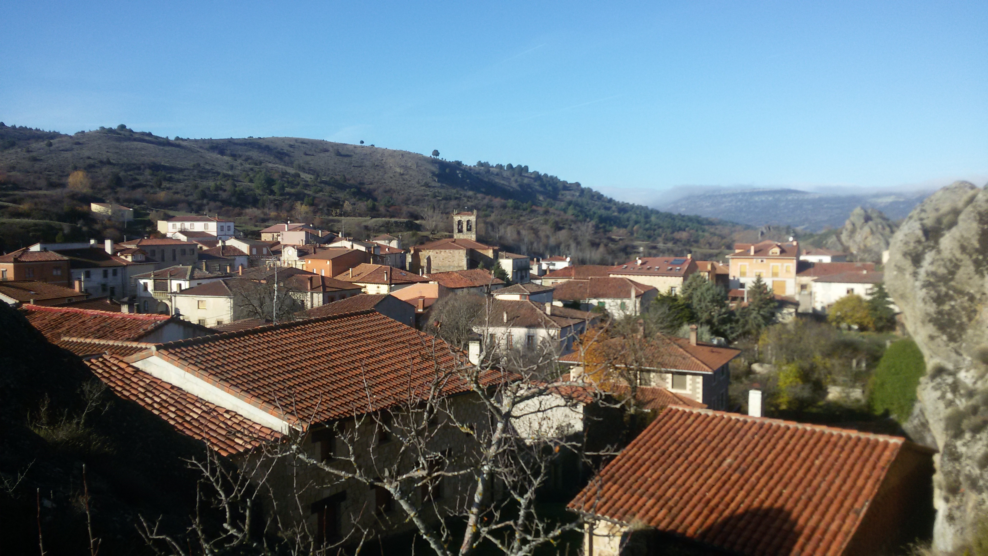 Panorámica del pueblo